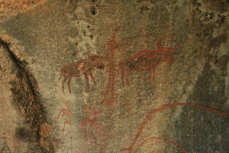 Bushman Paintings, Nsangwini, Eswatini